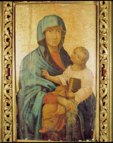 Маці Божая «Снежная». XVIII ст. в. Падлеснае Ляхавіцкага р-на